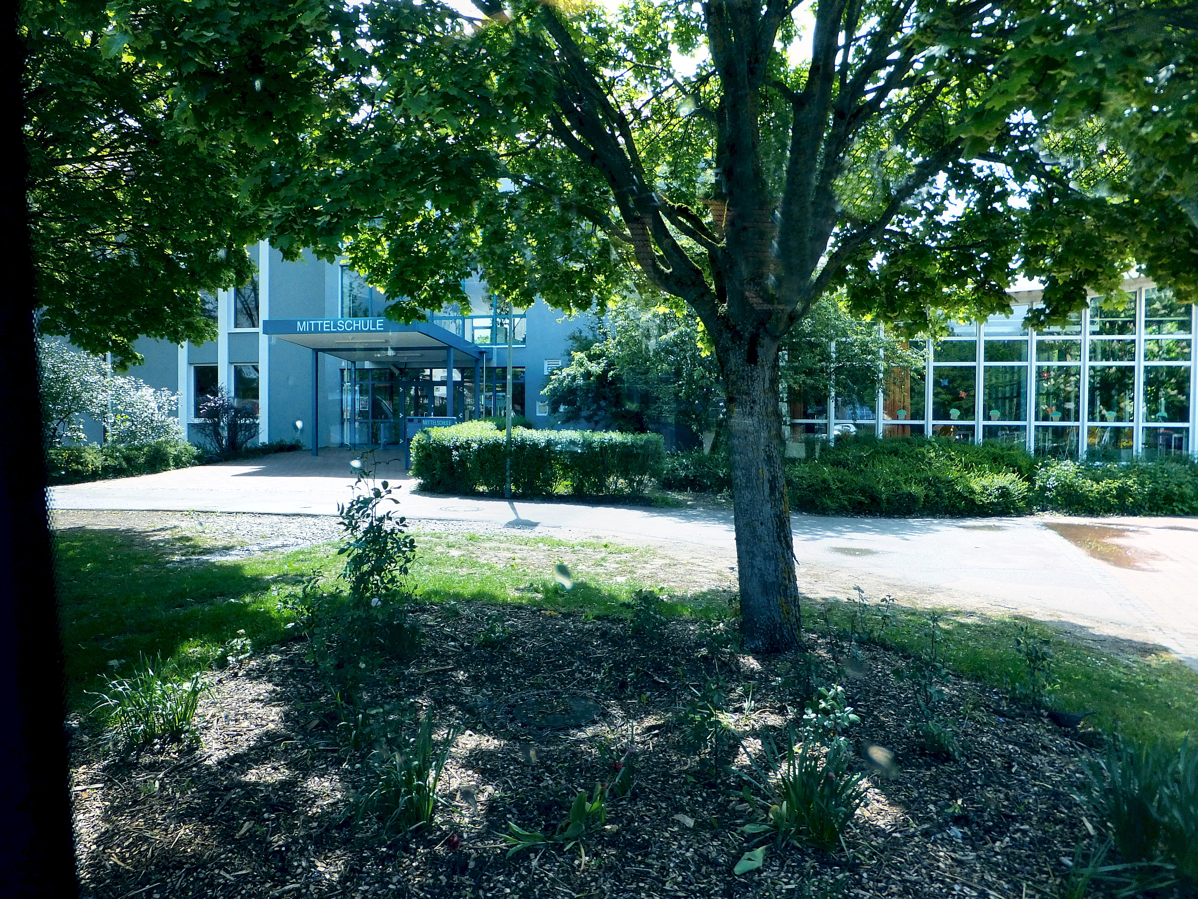 Unterschleißheim (Lohhof), Mittelschule an der Johann-Schmid-Str. - 1